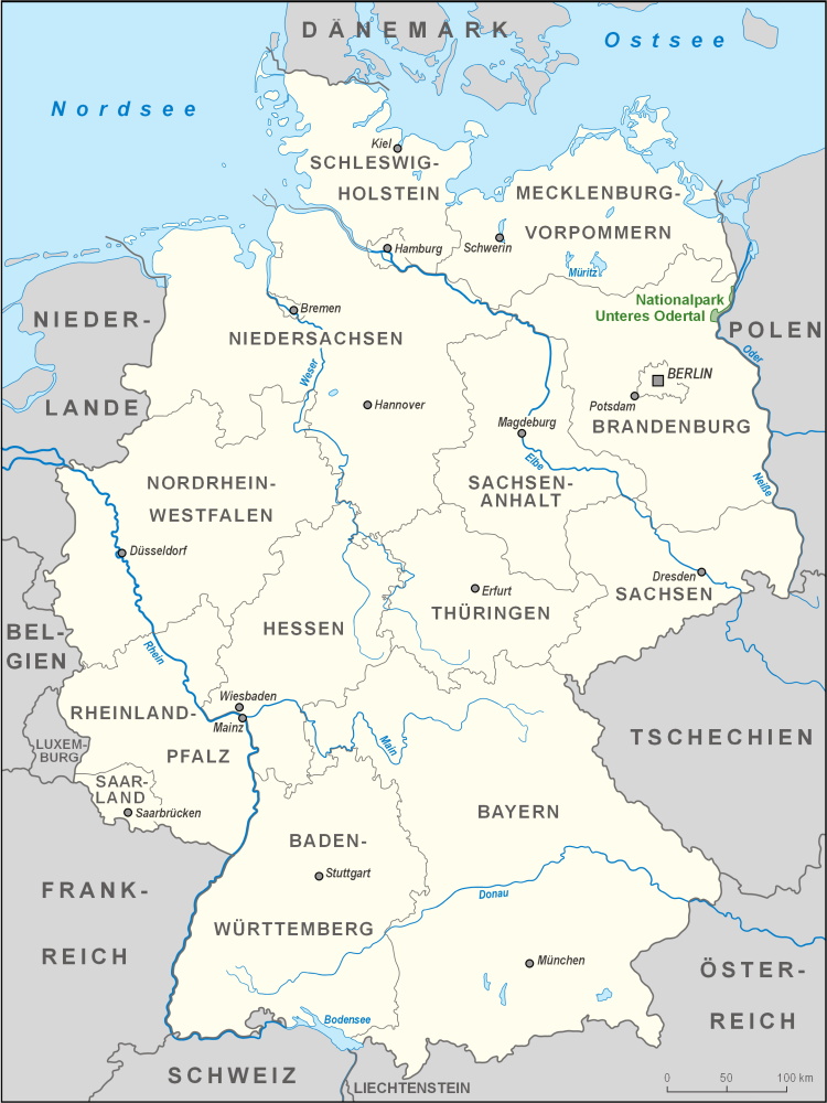 Karte des Nationalparks Unteres Odertal in Deutschland